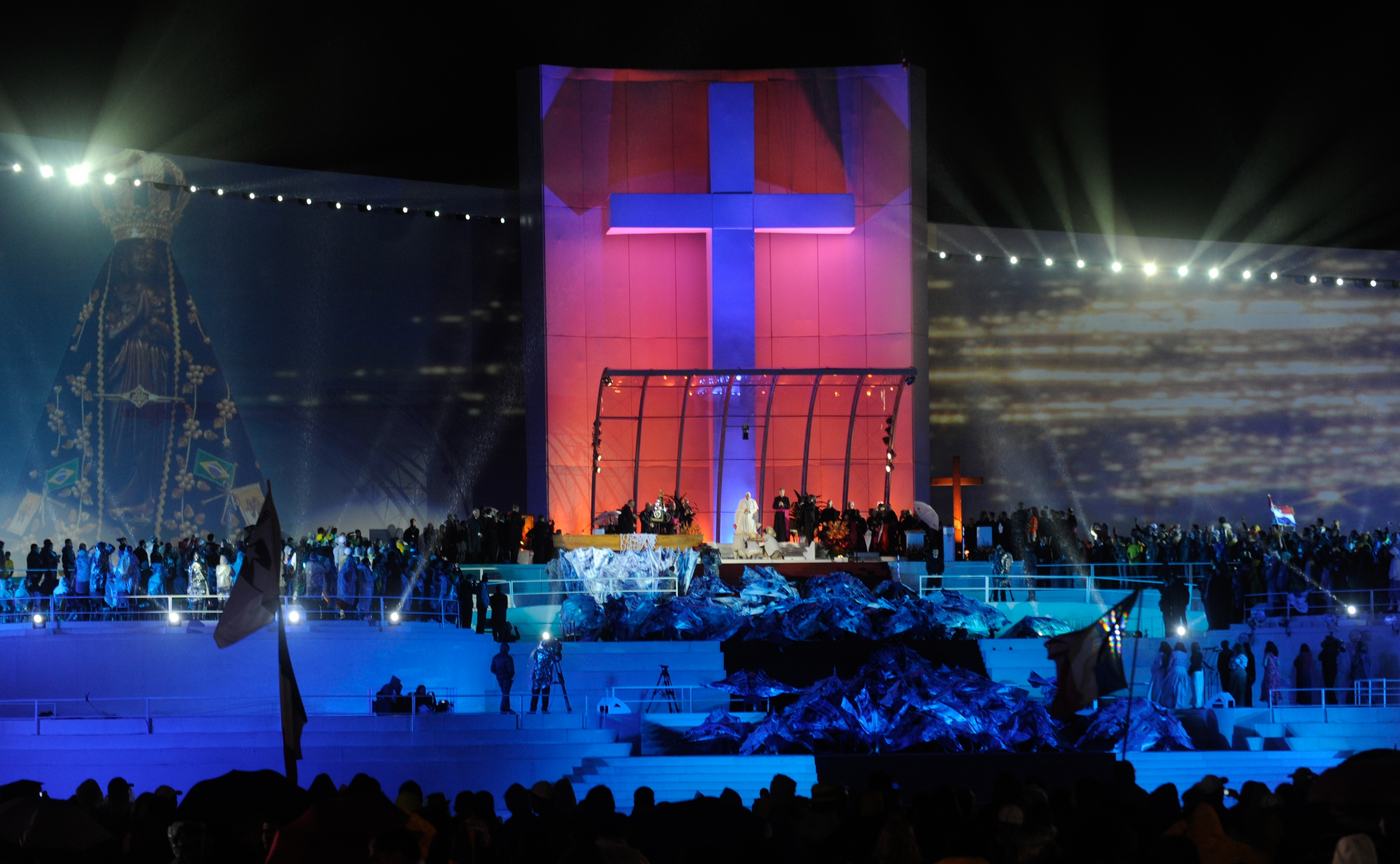 Rio de Janeiro – Festa da Acolhida, na orla de Copacabana